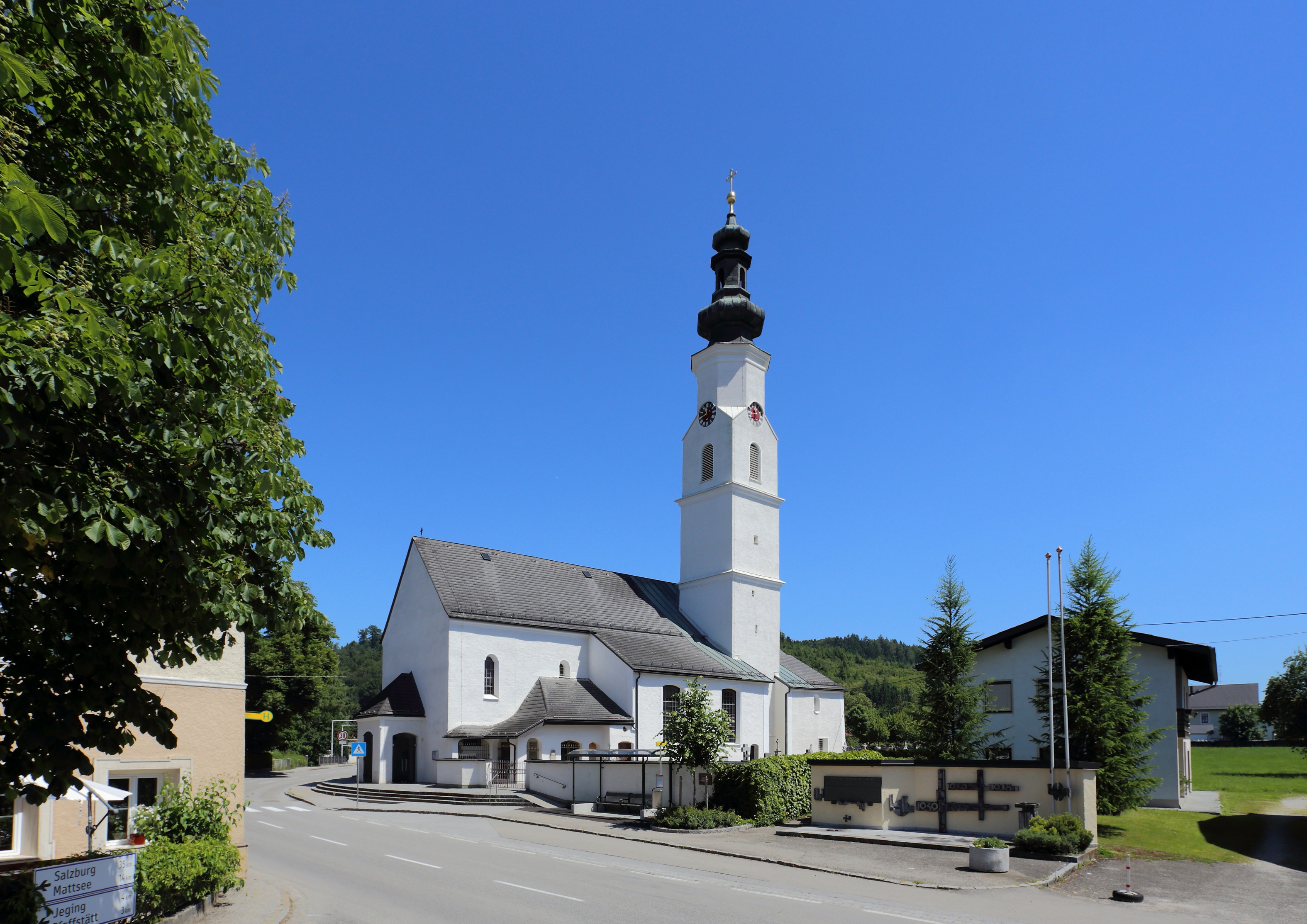 Südansicht der katholischen Pfarrkirche hl. Martin in der oberösterreichischen Gemeinde Munderfing. Eine spätgotische Kirche mit einem vierjochigen Langhaus, wobei das Westjoch 1934 angebaut wurde. Der Turmaufsatz ist im barockischen Stil.